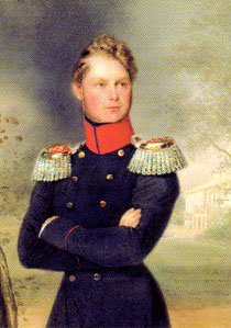 Portrait Prinz Carl von Preußen (1801-1883). Laut [preußen.de], dem das Bild entnommen ist, trägt Carl die Uniform eines Obersten des 12. Infanterieregiments. Im Hintergrund ist das Schloss Glienicke angedeutet.